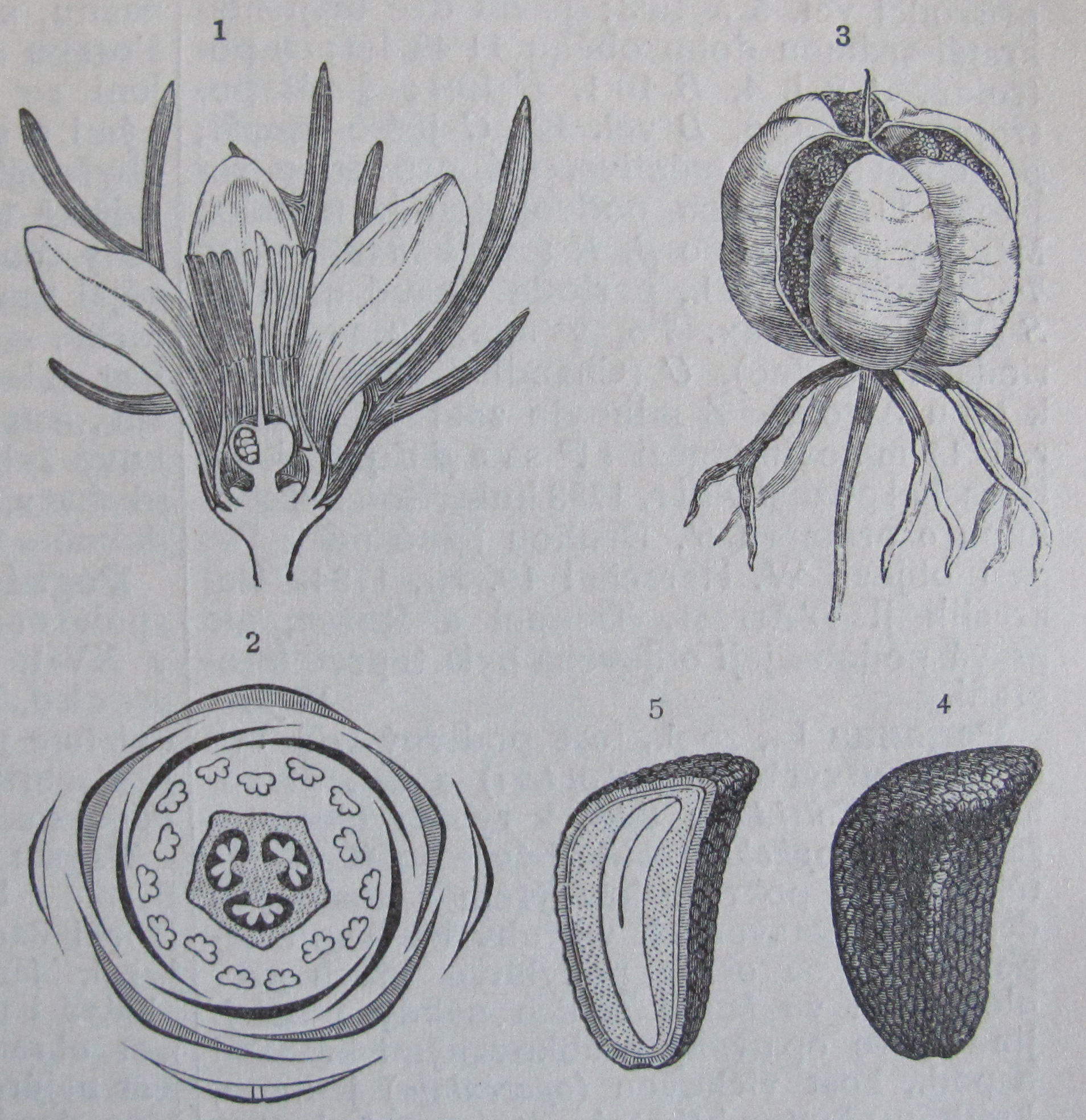 Původní popisek: Č. 3072. Peganum L., harmala. 1. květ v podélném průřezu; 2. květní diagramm; 3. plod; 4. semeno; 5. semeno v průřezu podélném.